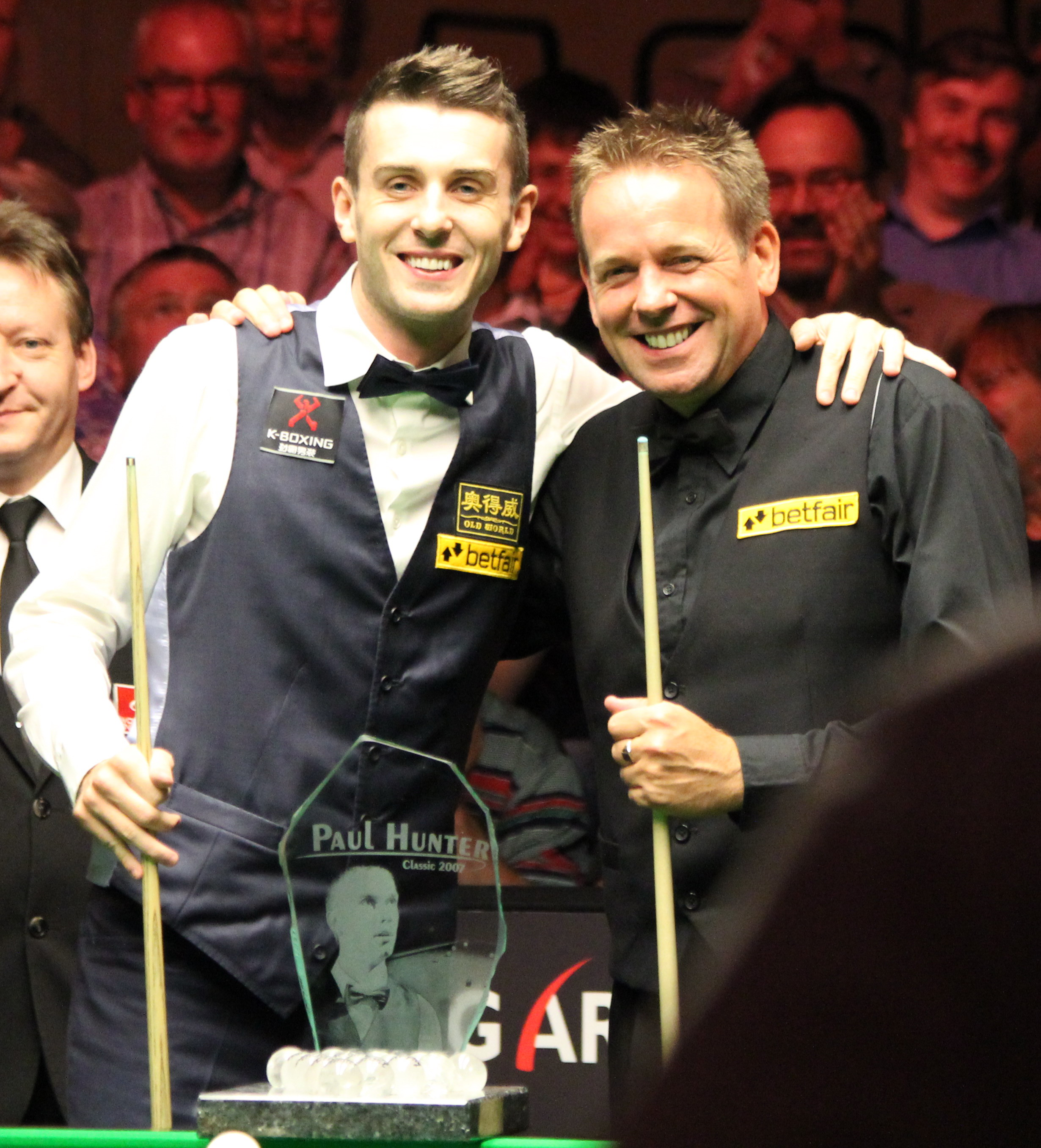 Die Finalisten des Paul Hunter Classic 2012 Mark Selby (links) und Joe Swail (rechts)